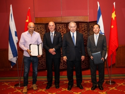 דייויד לב (משמאל) בטקס חתימה בין EWP לבין קרן השקעות סינית, בנוכחות בנימין נתניהו ומתן וילנאי